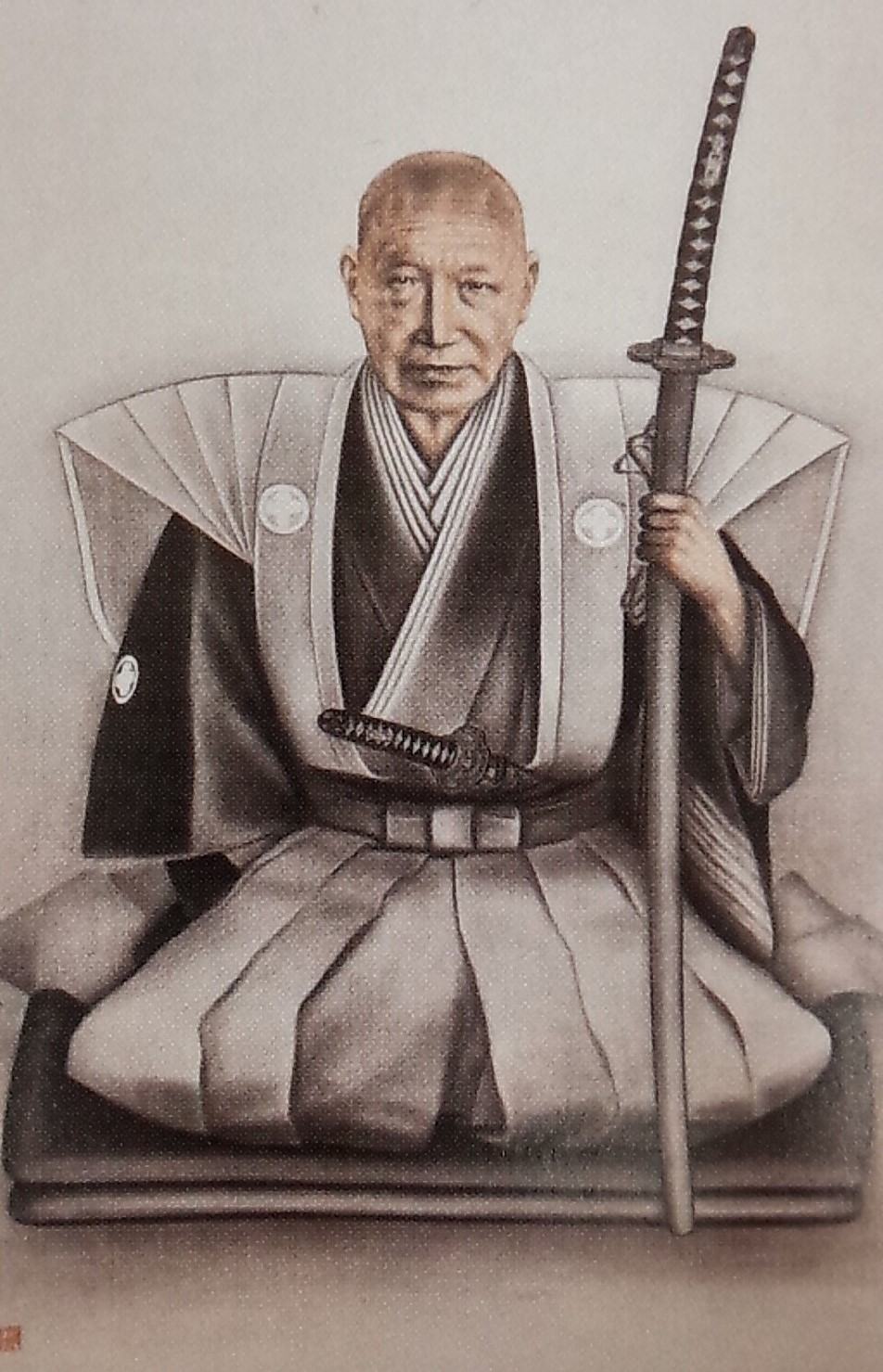 内藤頼寧の肖像。